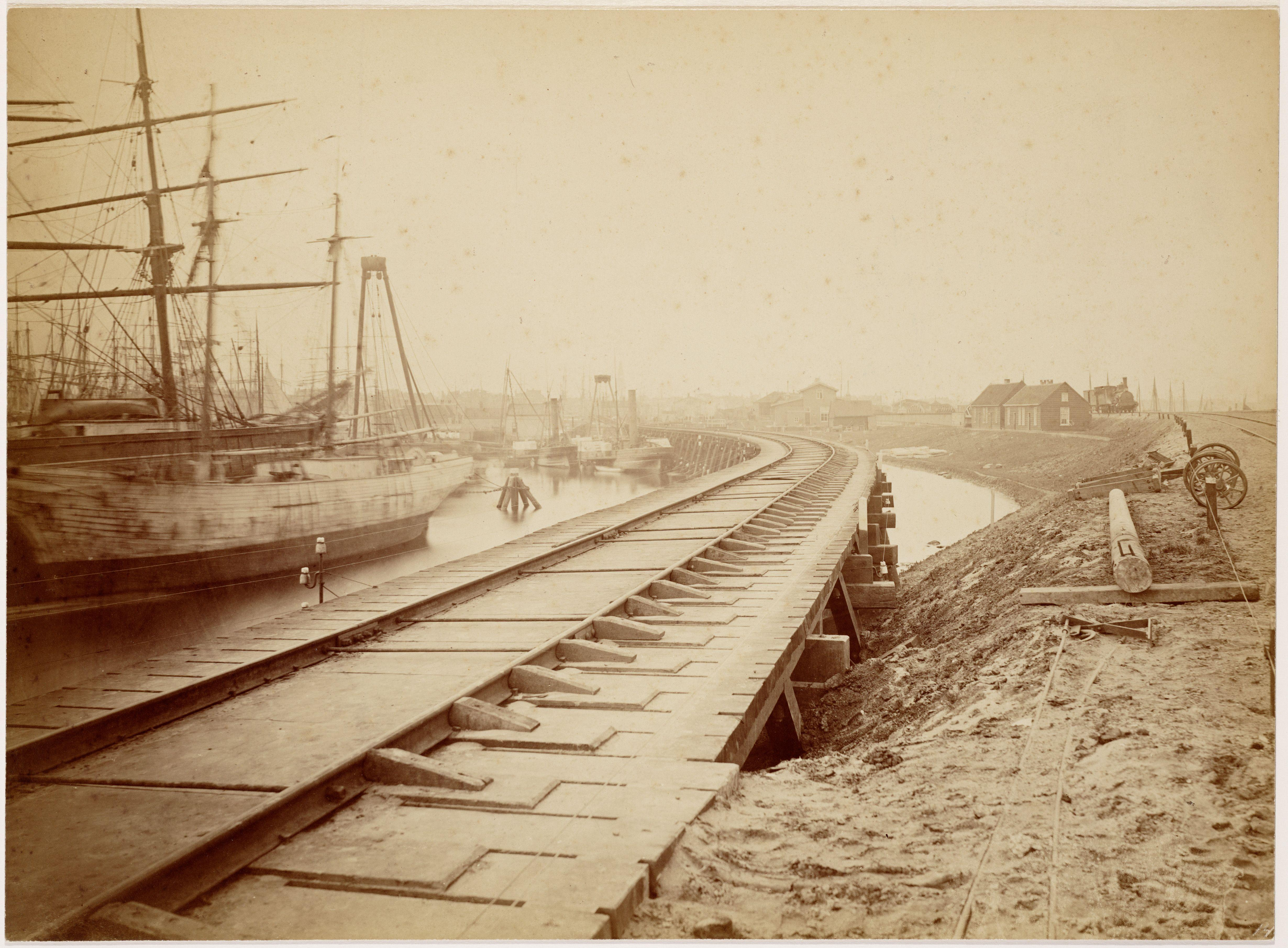 Beschrijving Oosterspoorweg De aanleg van de Oosterspoorweg nabij de spoorbrug Oosterdoksluis. Een tijdelijke spoorlijn over de Oosterdoksdoorgang, ten zuiden van de definitieve spoorbrug. Gezien in westelijke richting. Dit is nummer 1 in een reeks foto's die Pieter Oosterhuis maakte rondom het Centraal Station in aanbouw. Serie: Oosterhuis, Bouw van het Centraal Station Documenttype foto Vervaardiger Oosterhuis, Pieter Collectie Collectie A.M.J. Hendrichs Datering 1874 ca. Inventarissen Afbeeldingsbestand 010017000037 Generated with Dememorixer